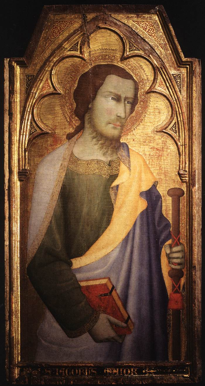 Il dipinto (tempera su tavola) è un pannello che faceva parte di un polittico, precocemente smembrato e disperso, un tempo nella chiesa del castello di Casaluce.